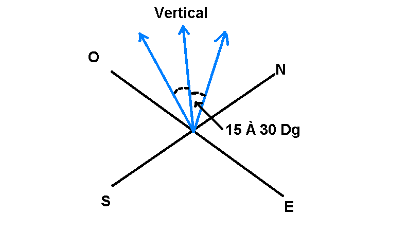 Schéma de fonctionnement d'un profileur, un radar pointant verticalement, qui sert à mesurer le vent horizontal et le mouvement vertical de l'air. Il fonctionne par diffusion de Braggs des ondes de turbulence. Licensing Source: Diagramme personnel libre de tout droit. Pierre_cb Catégorie:Schémas